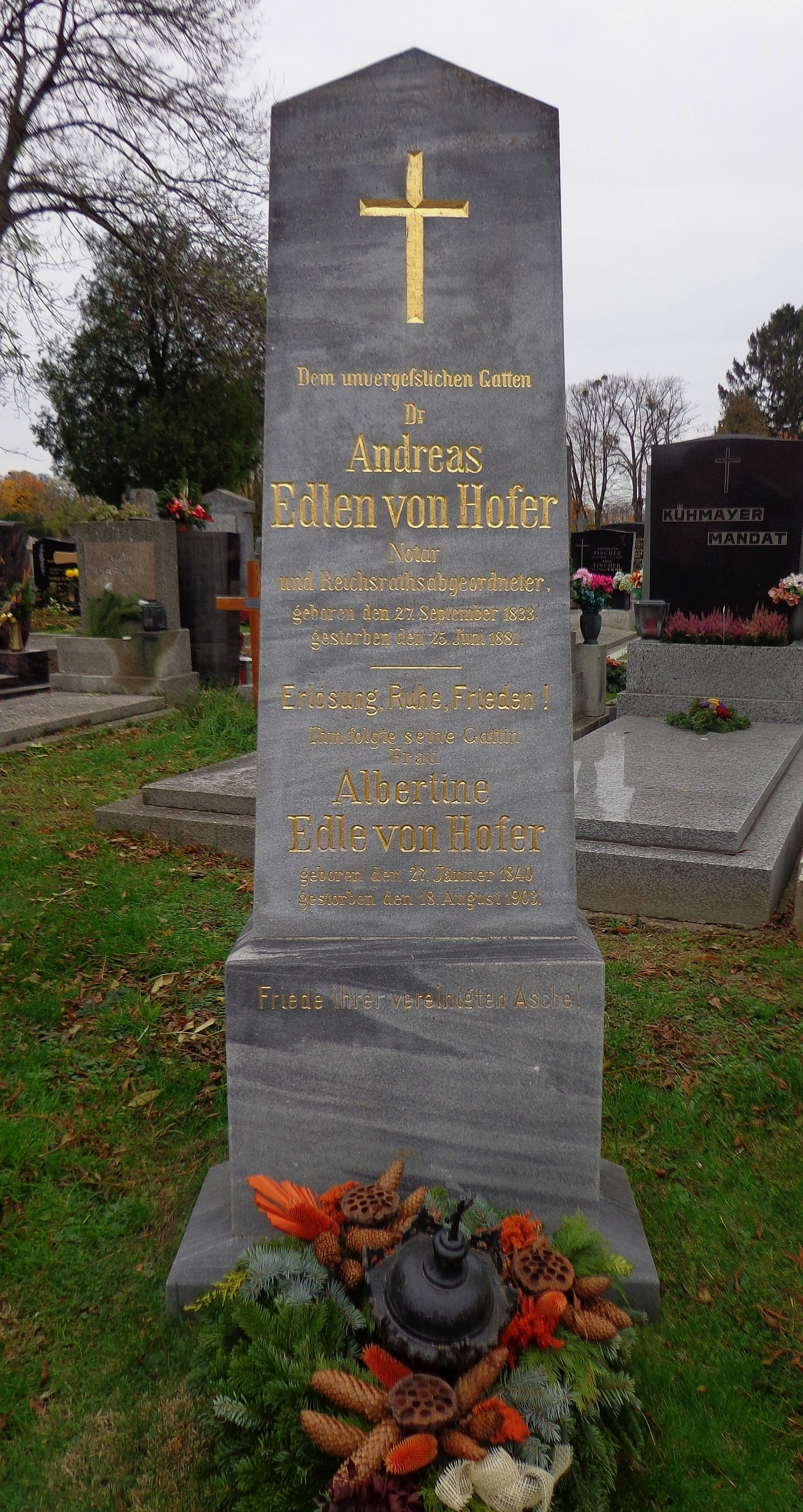 Wiener Zentralfriedhof - Gruppe 12A, Reihe 3, Nr. 10: Grab des Notars und Politikers Dr. Andreas Edlen von Hofer (1833–1881). Er war einer der Söhne des Johann Edlen von Hofer (1794–1855), k. k. Tabakhauptverlegers in Fischamend, des einzigen Sohnes des Tiroler Freiheitskämpfers Andreas Hofer (1767–1810).